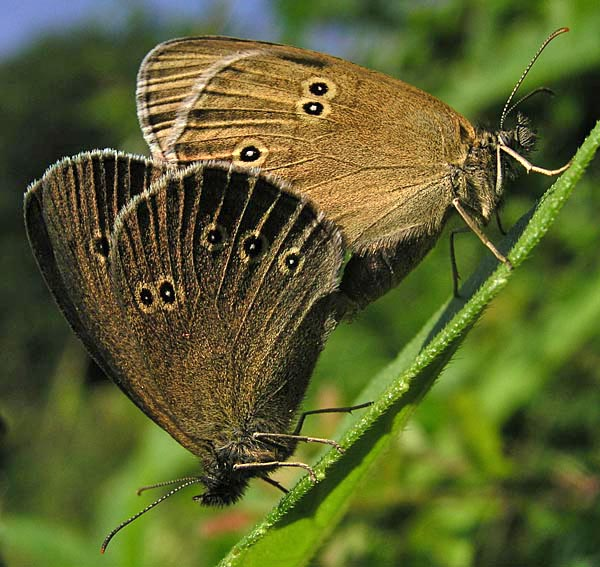 Schornsteinfeger bzw. Brauner Waldvogel (aphantopus hyperantus), aufgenommen am Waldrand in der Nähe von Oppenrod)